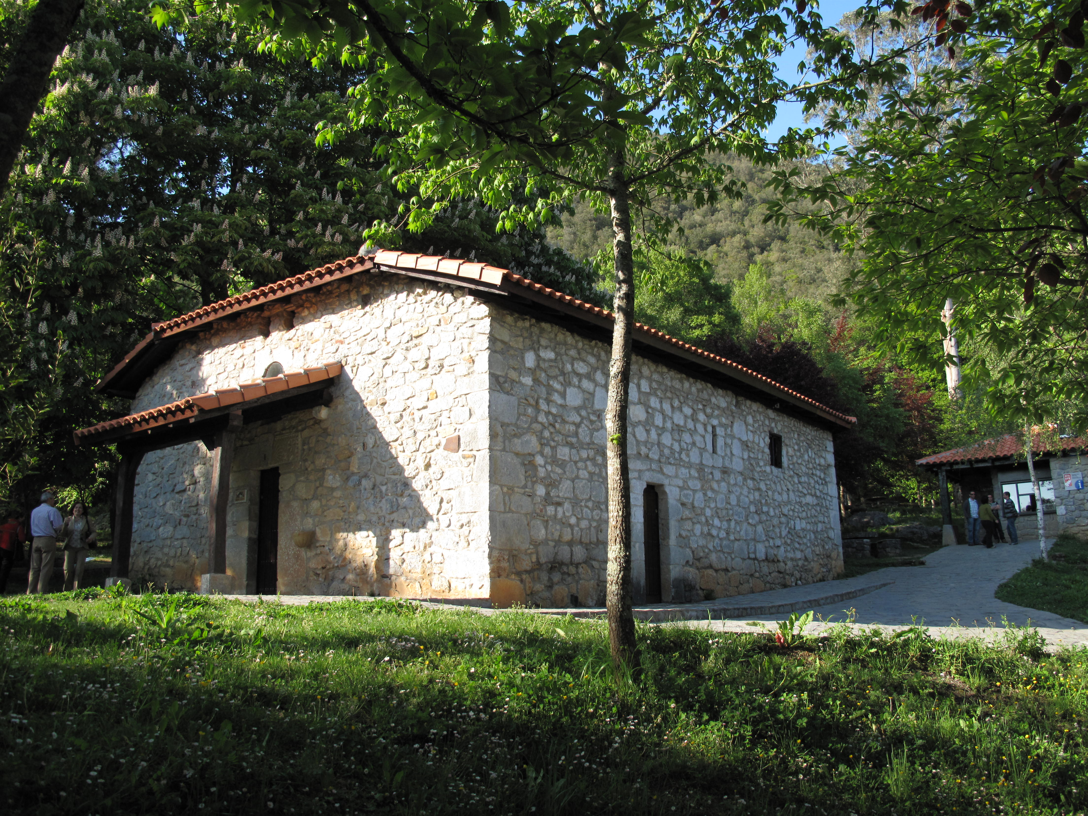 Ermita San Mames, en Kortezubi, Vizcaya